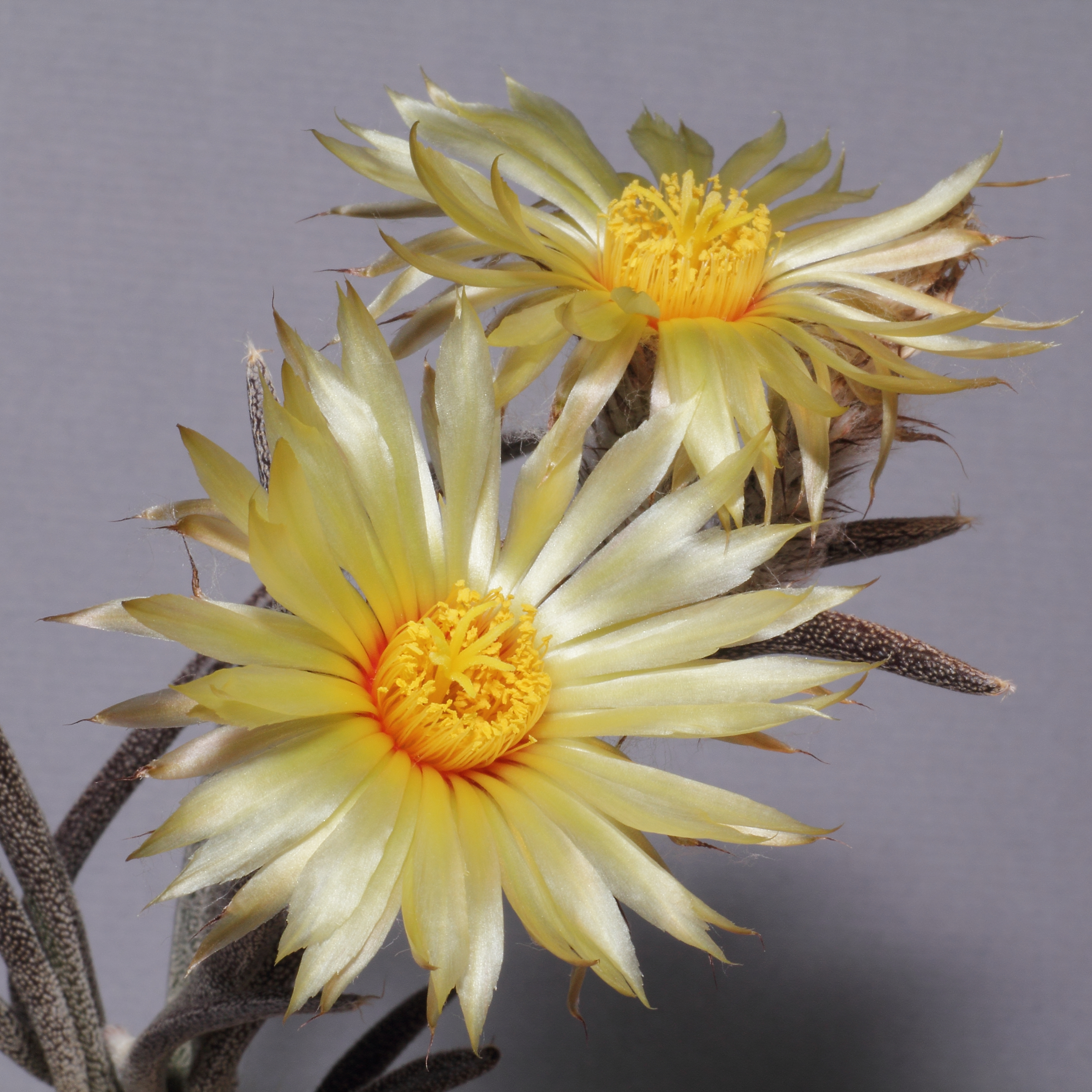 Två blommor på samma planta av medusakaktus. Plantan är ympad, men blommorna är desamma.